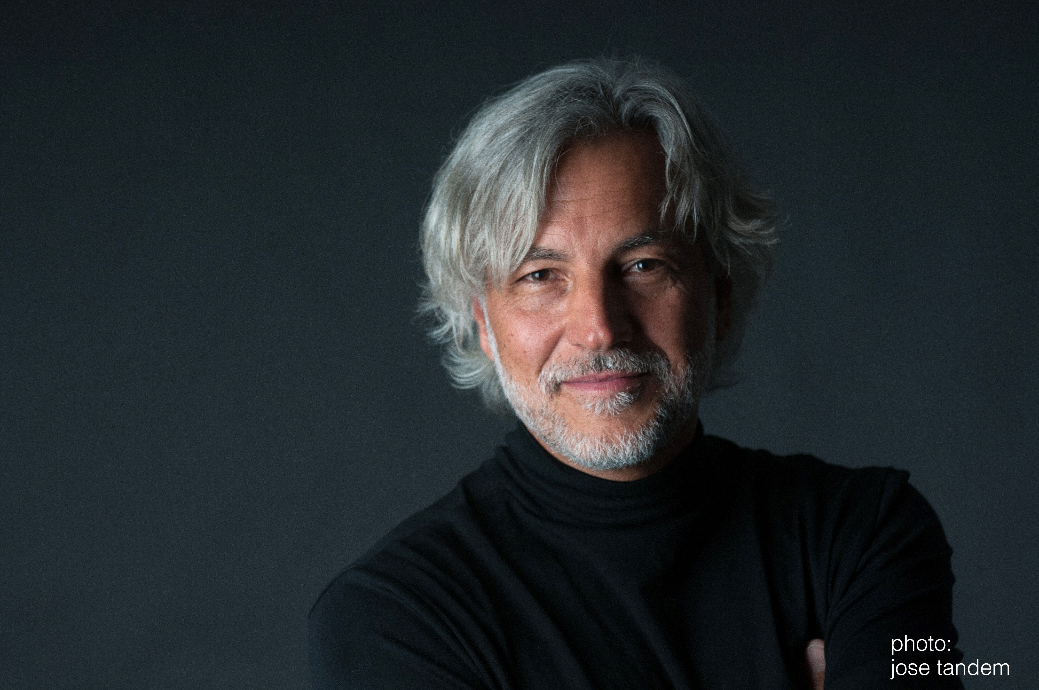 На Фото Крис Сфирис, фото сделано фотографом Jose Tandem, в Мадриде, Испания.